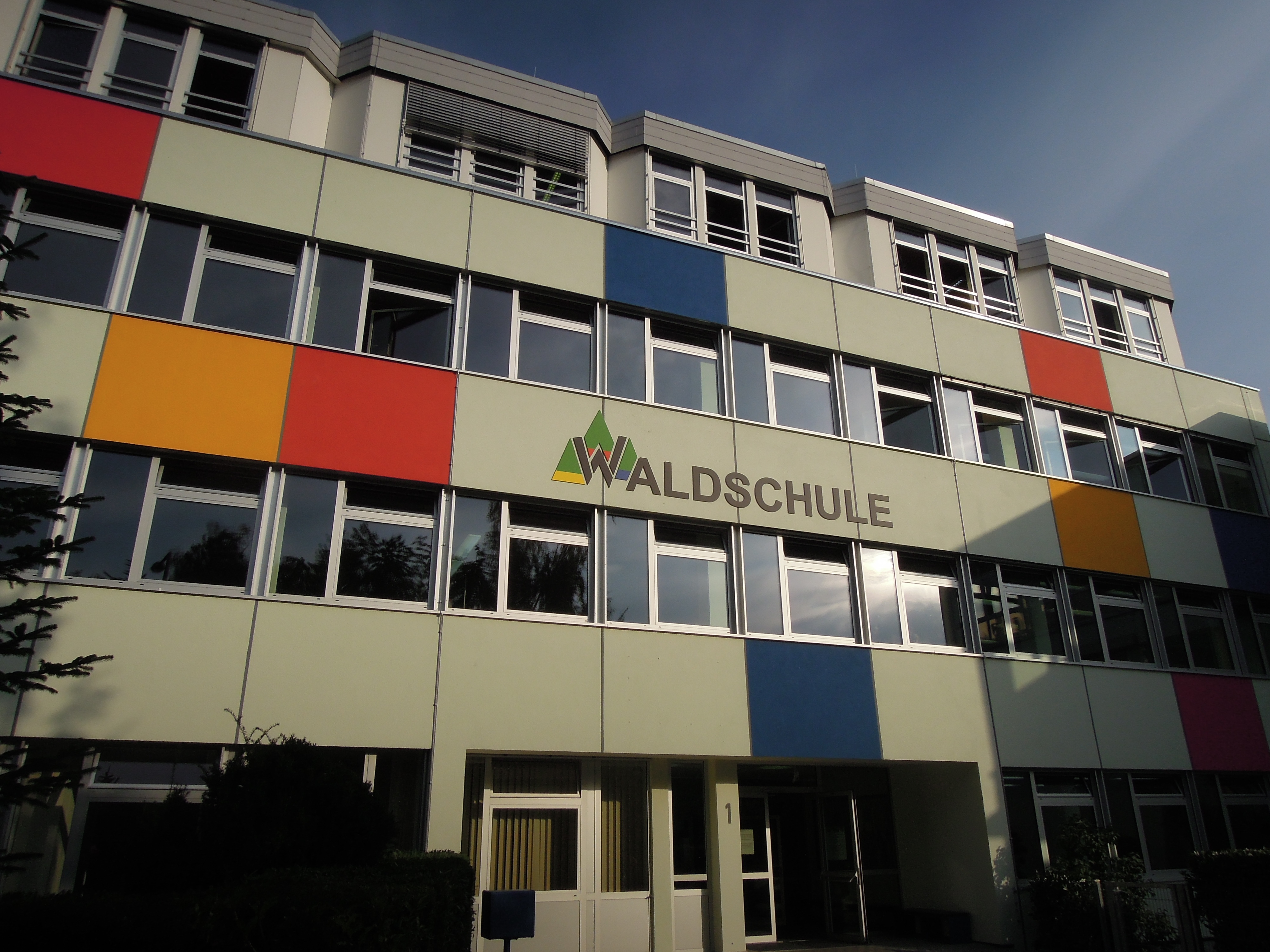 Haupteingang der Waldschule-Degerloch